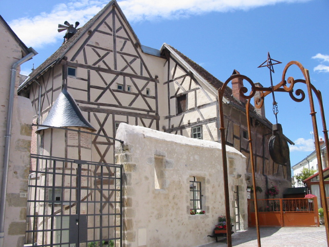 Maisons à colombages du XVème s.